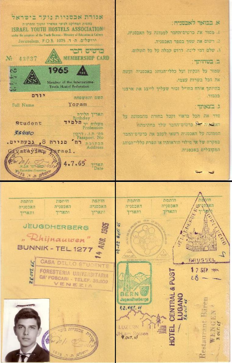 אגודת אכסניות נוער בישראל, כרטיס חבר